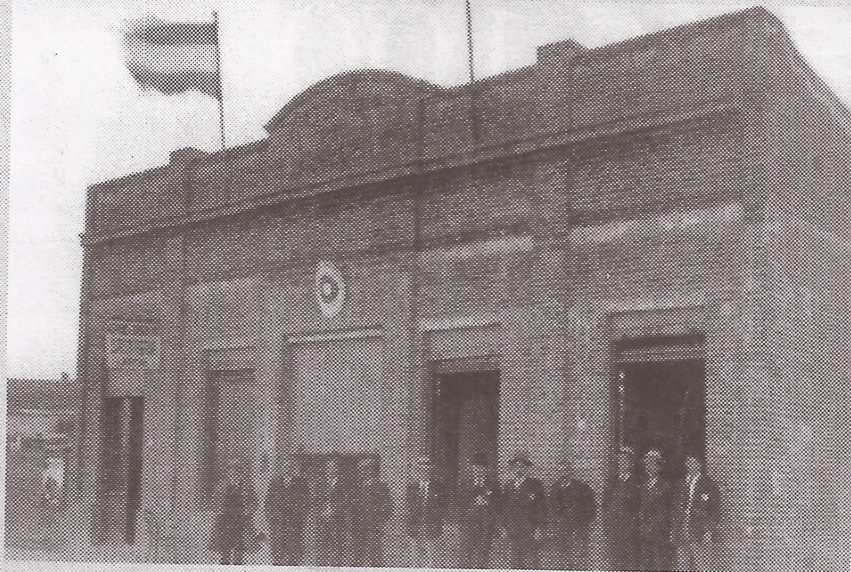 Primera sede la Asociación Portugesa de Comodoro Rivadavia, Chubut, Argentina ca.1923